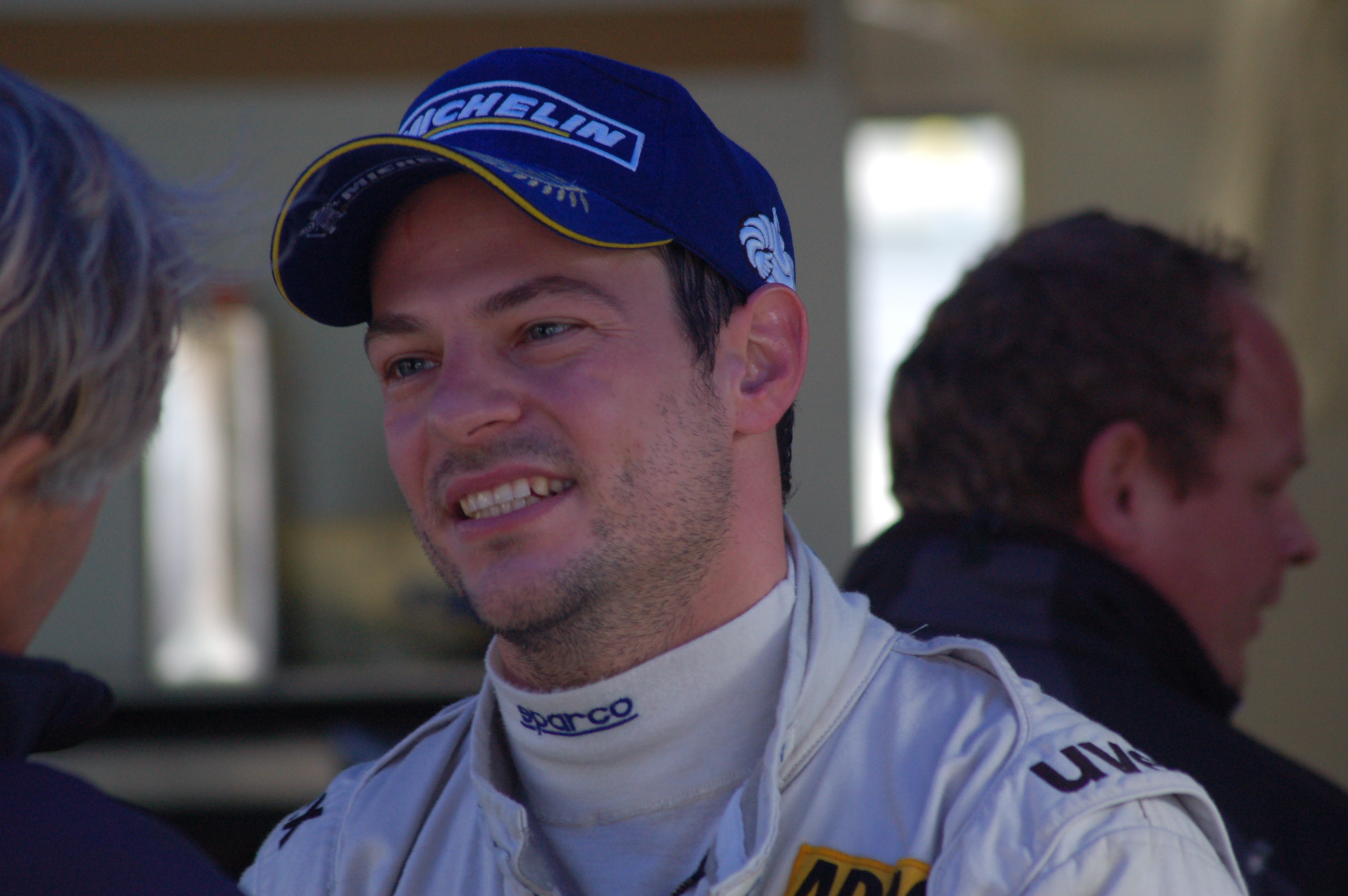 Alexandros Margaritis in Assen 2011